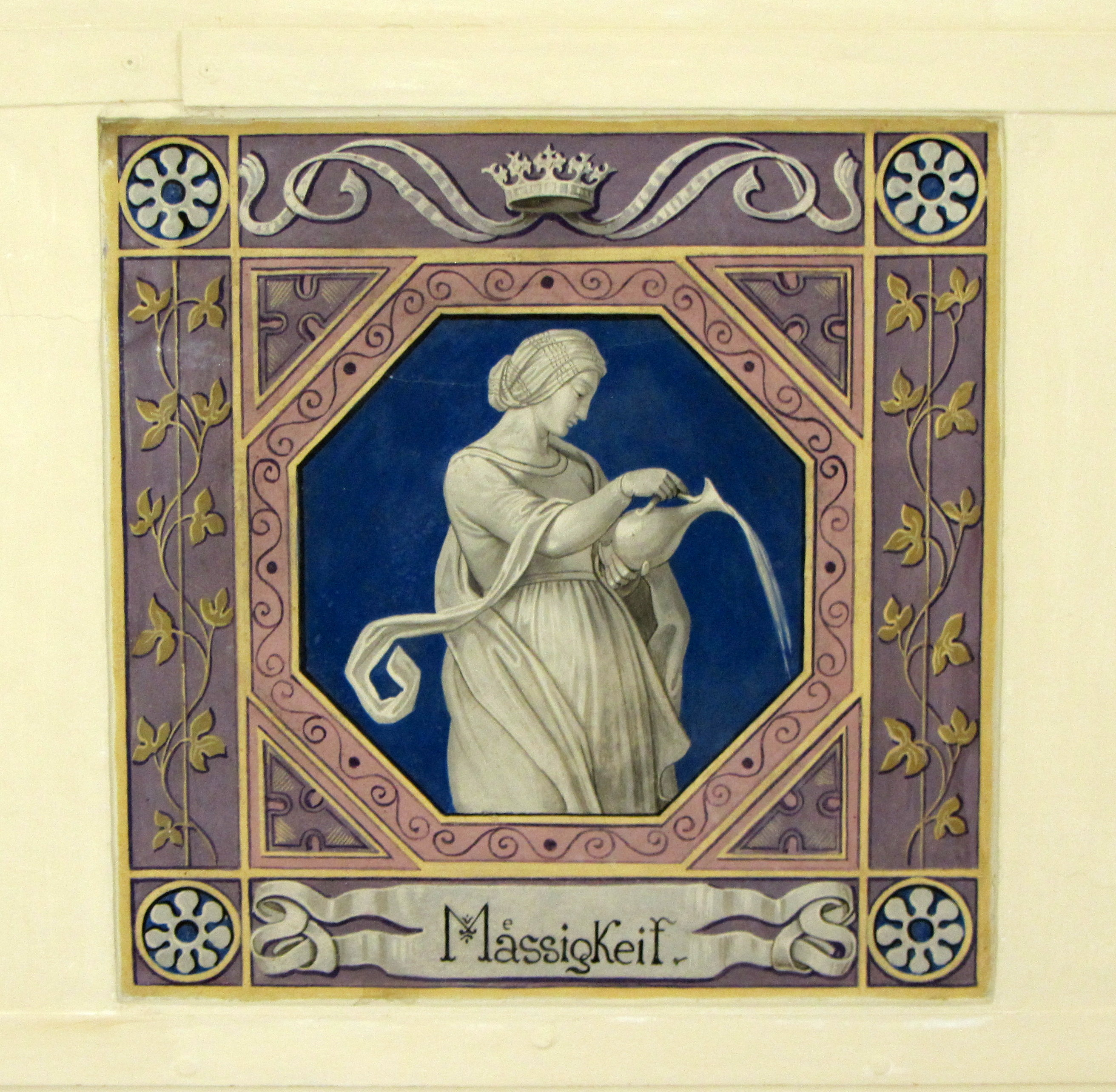 Maria im Busch - Deckenfresken (verwackelt)